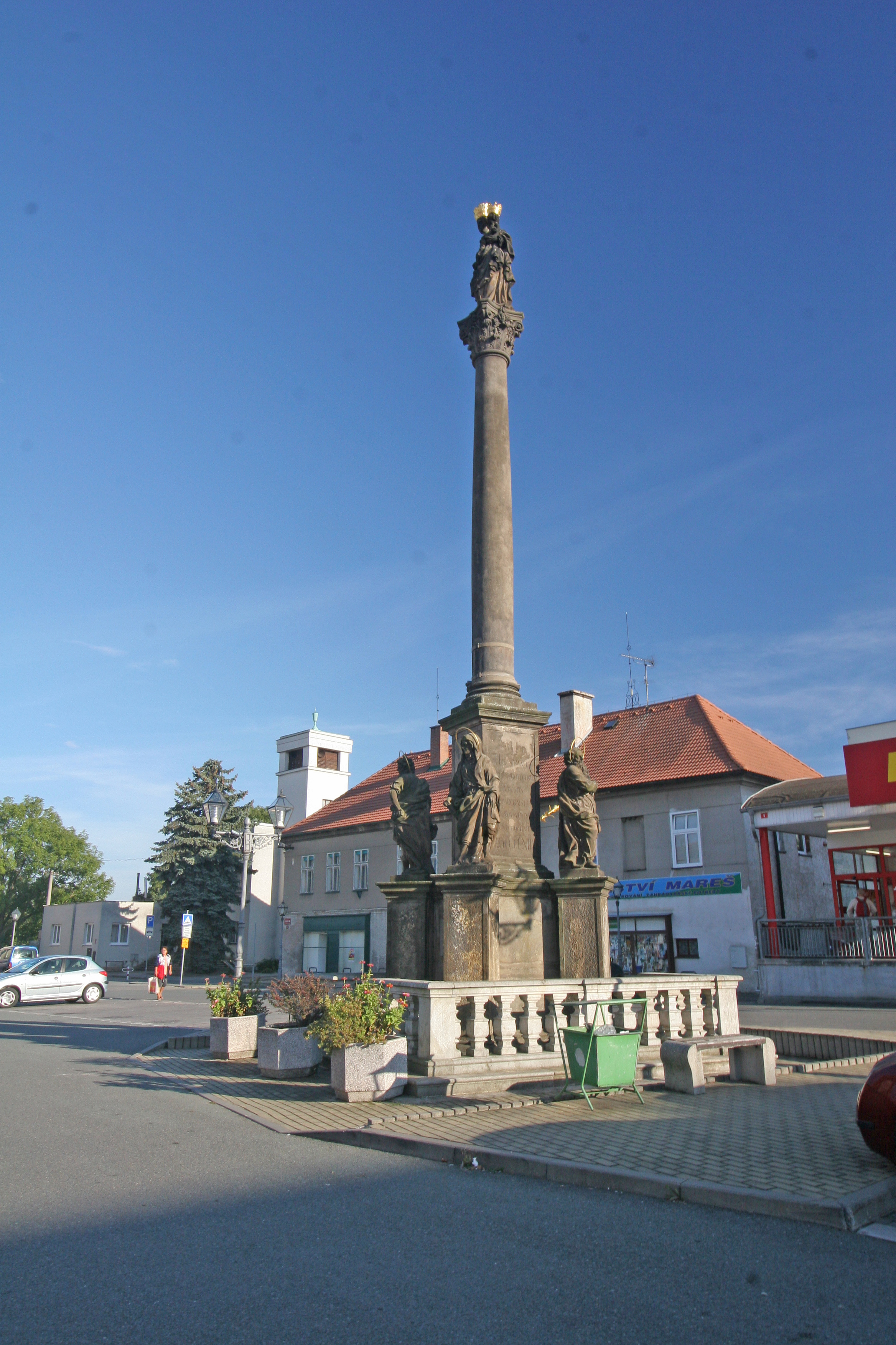 Sousoší Mariánského sloupu (Chlumec nad Cidlinou), Klicperovo náměstí, Chlumec nad Cidlinou